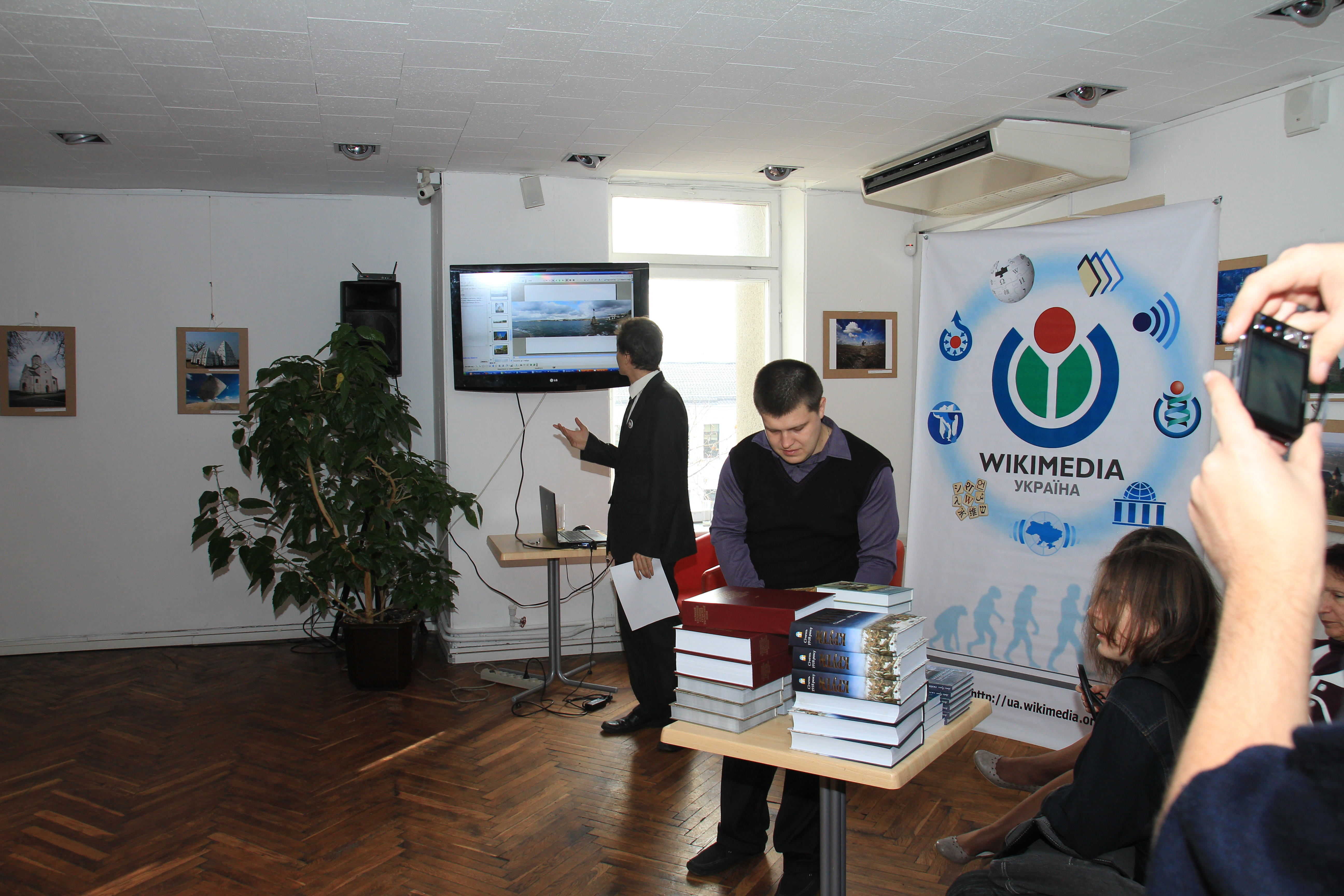 Нагородження переможців української частини фотоконкурсу "Вікі любить пам'ятки"